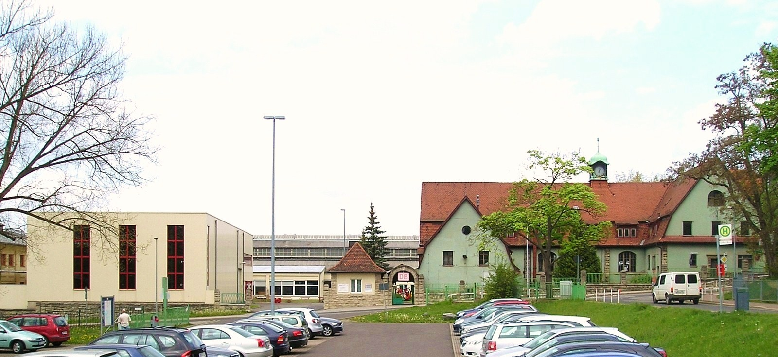 Haupteingang des Dampflokwerks in Meiningen, im Hintergrund die Lokhalle